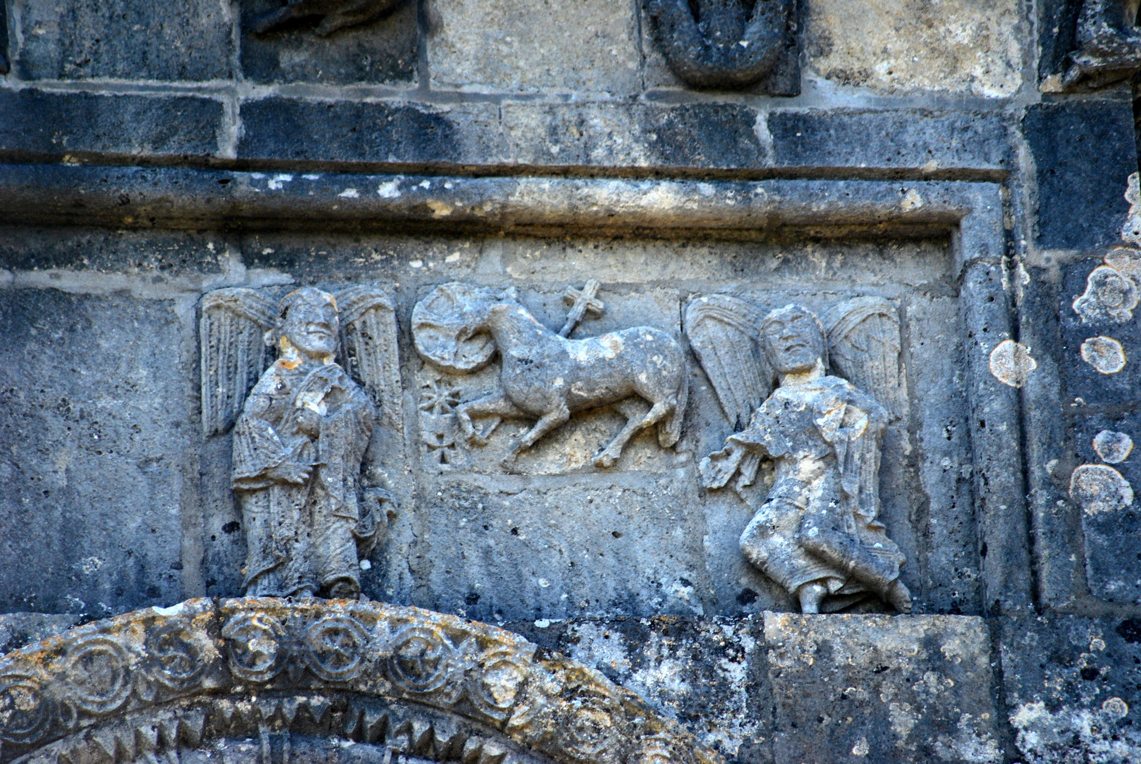 Loupiac église Saint Pierre